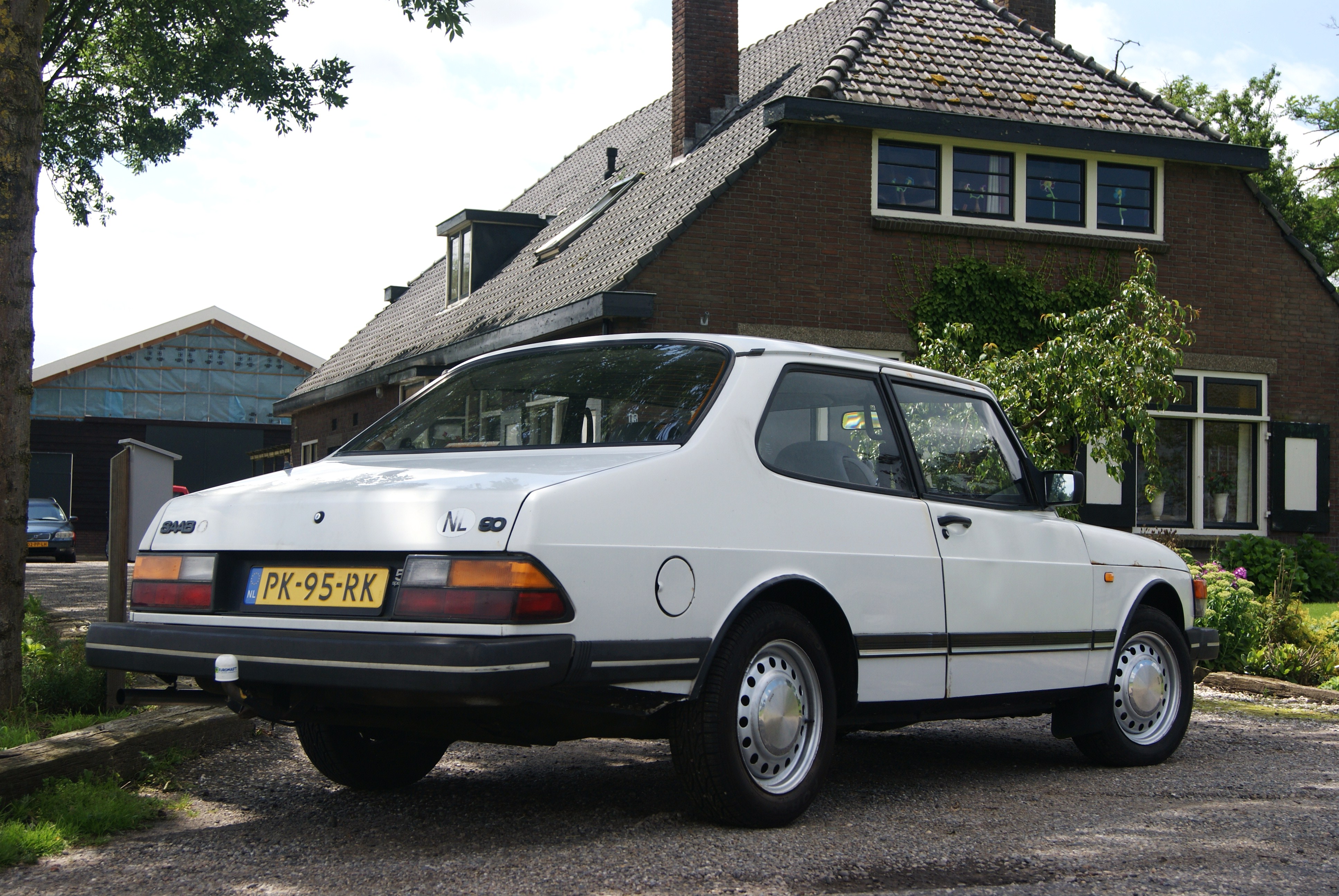 My ex-car